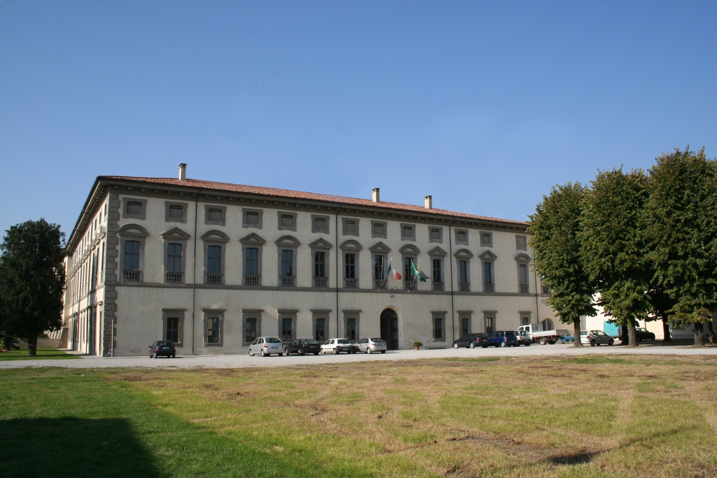 Autore Giorces.Brignano Gera d'Adda, Palazzo Vecchio, Visconti.